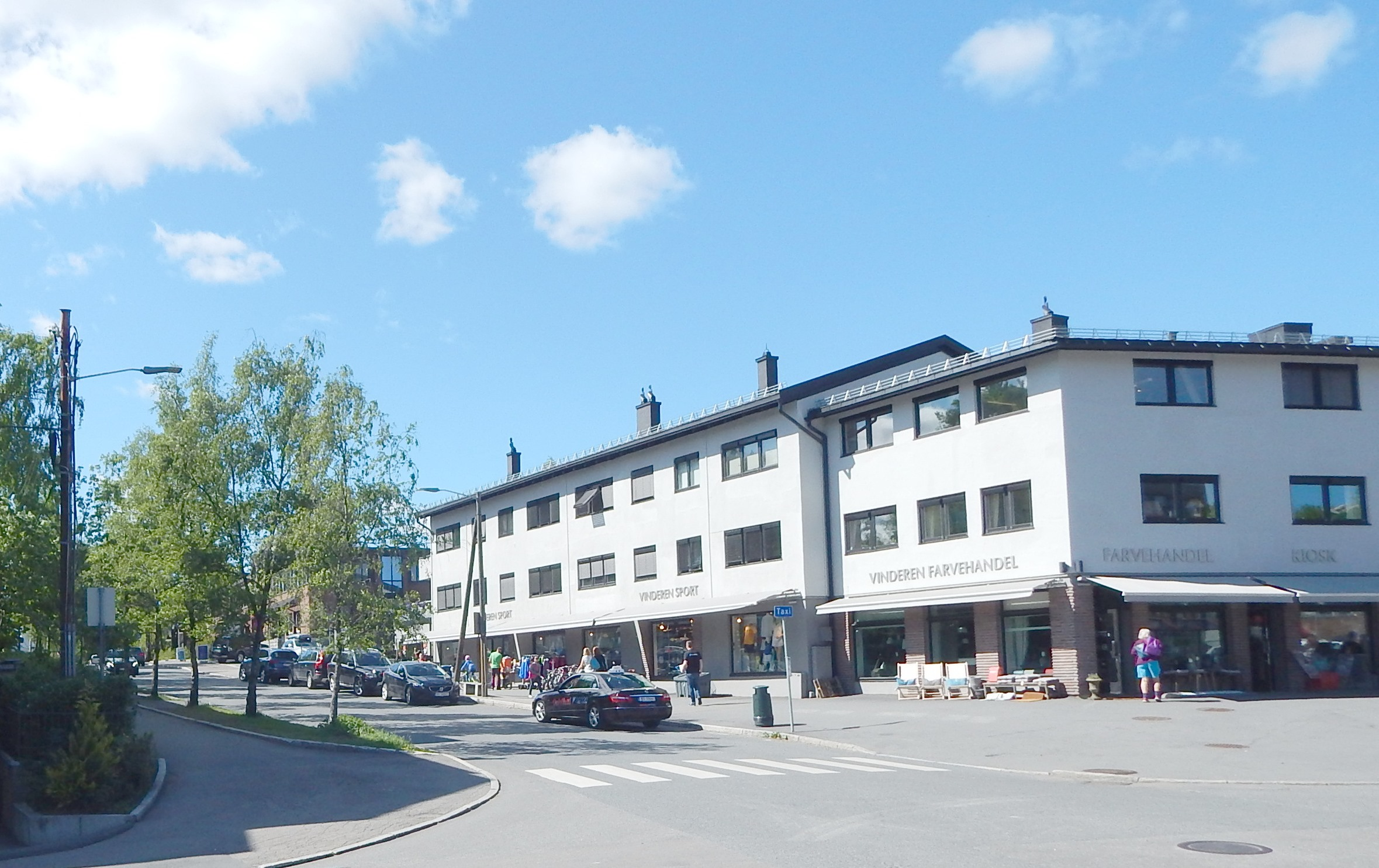 Holmenveien på Vinderen